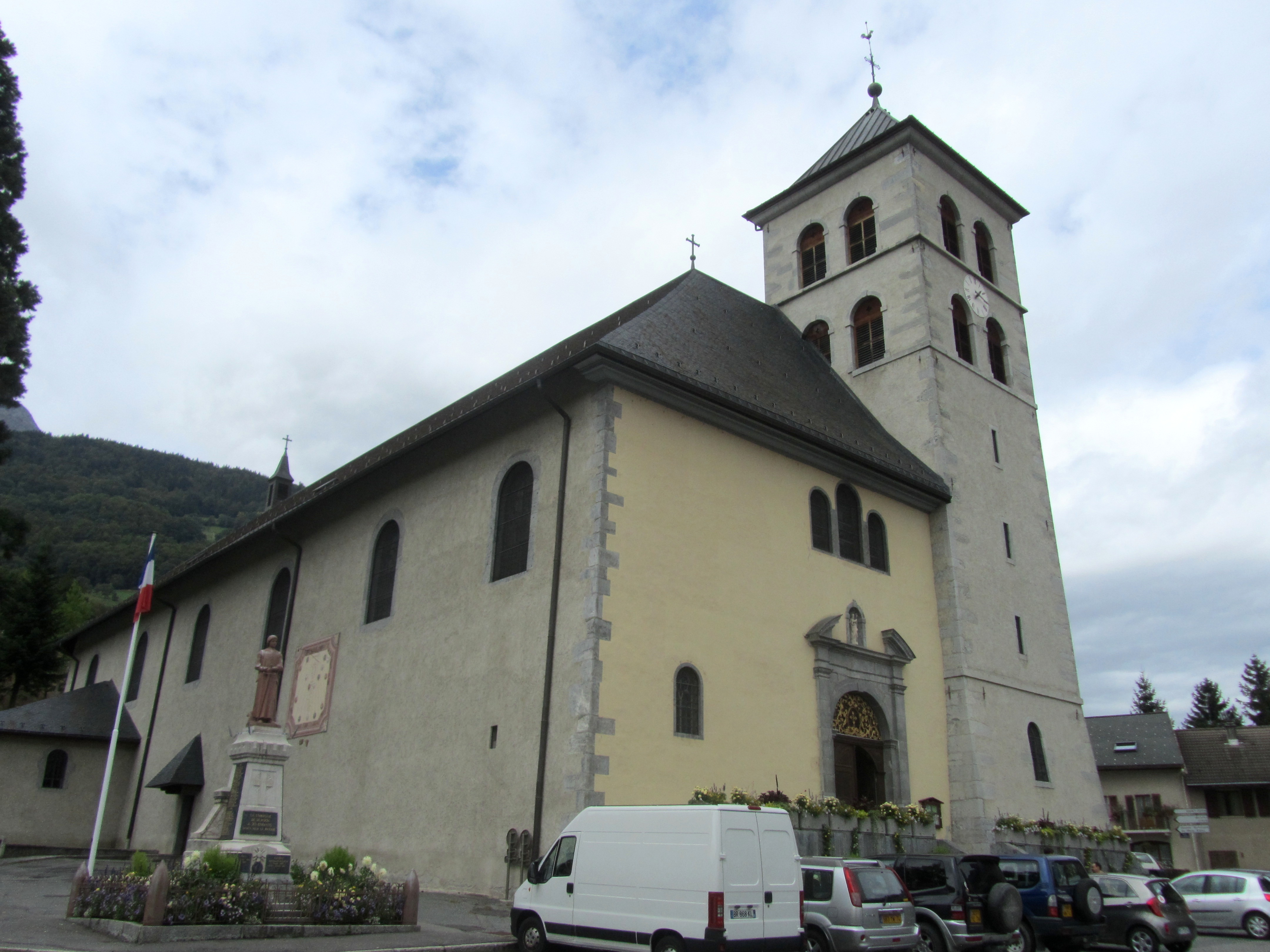 Église de Sallanches (Haute-Savoie)